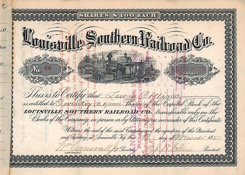 Share of the Louisville Southern Railroad Co. from the 1st March 1887